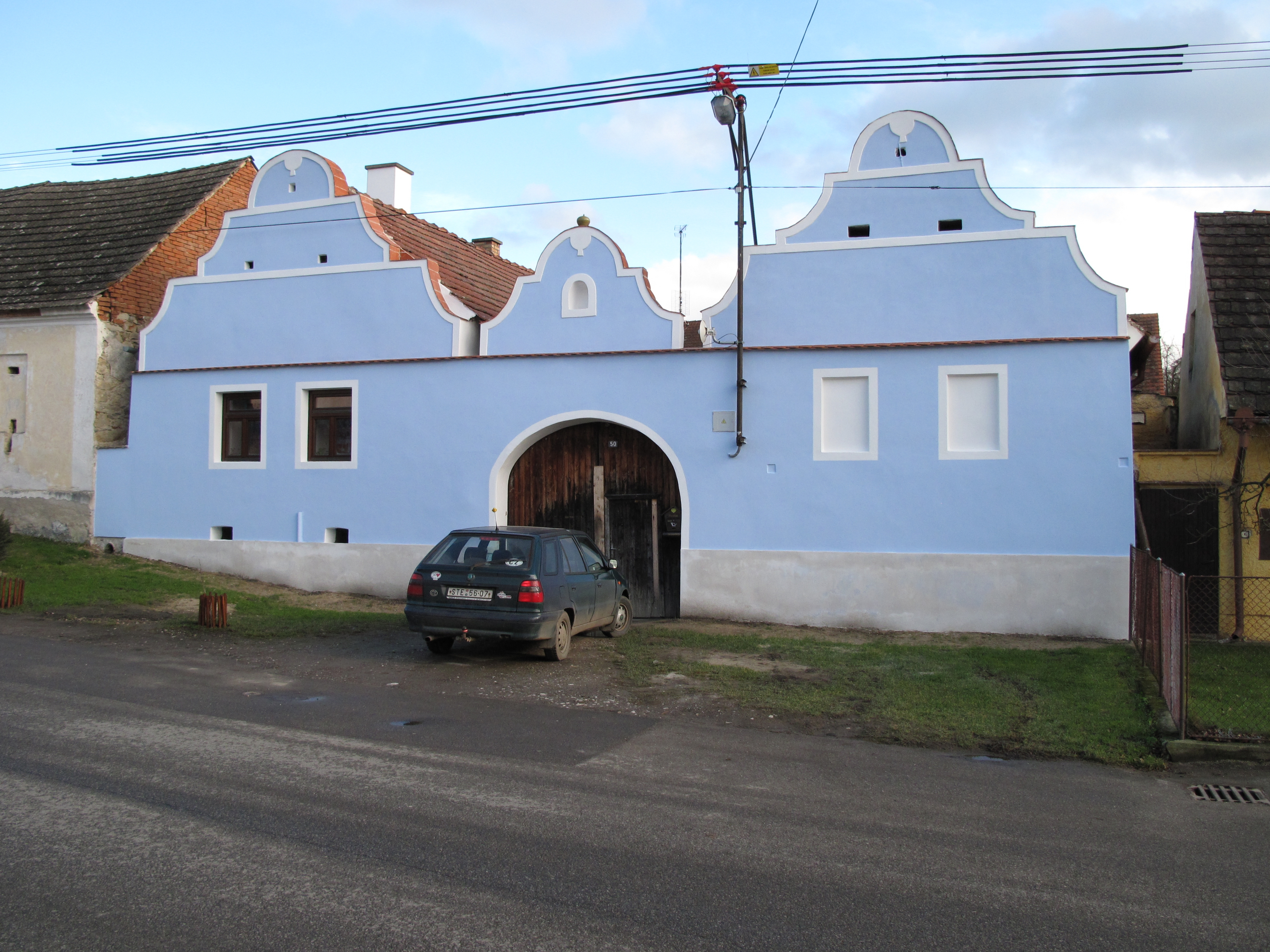 Modrý statek v Přešťovicích. Okres Strakonice, Česká republika. Čp. 50.